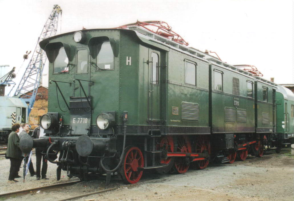 E 77 10 am 18. Mai 2003 bei einer Ausstellung um Bw Dresden-Altstadt. Aufnahme: Steffen Mokosch